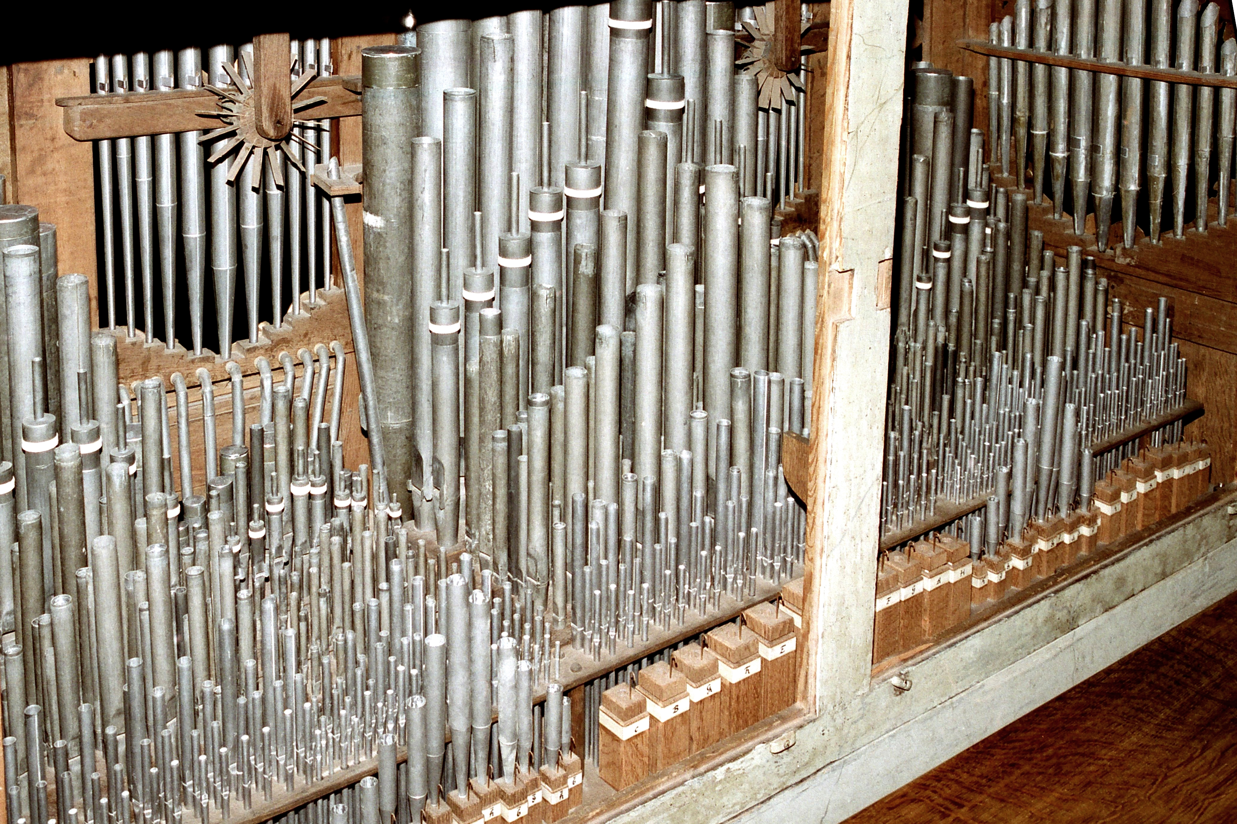 Norden Ludgeri, Orgel, Blick von hinten ins Rückpositiv